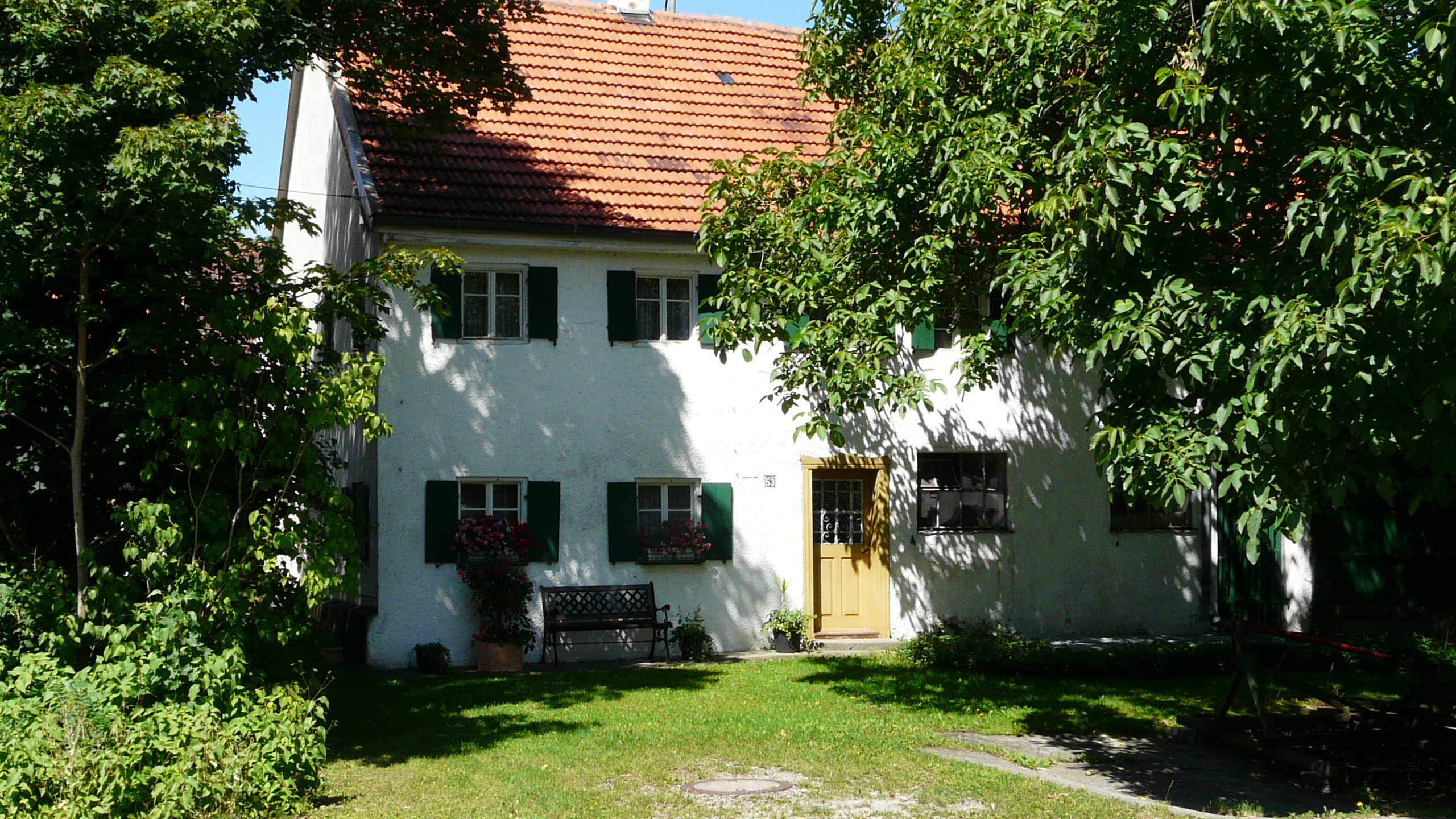 Hauptstr. 53 in Prittriching